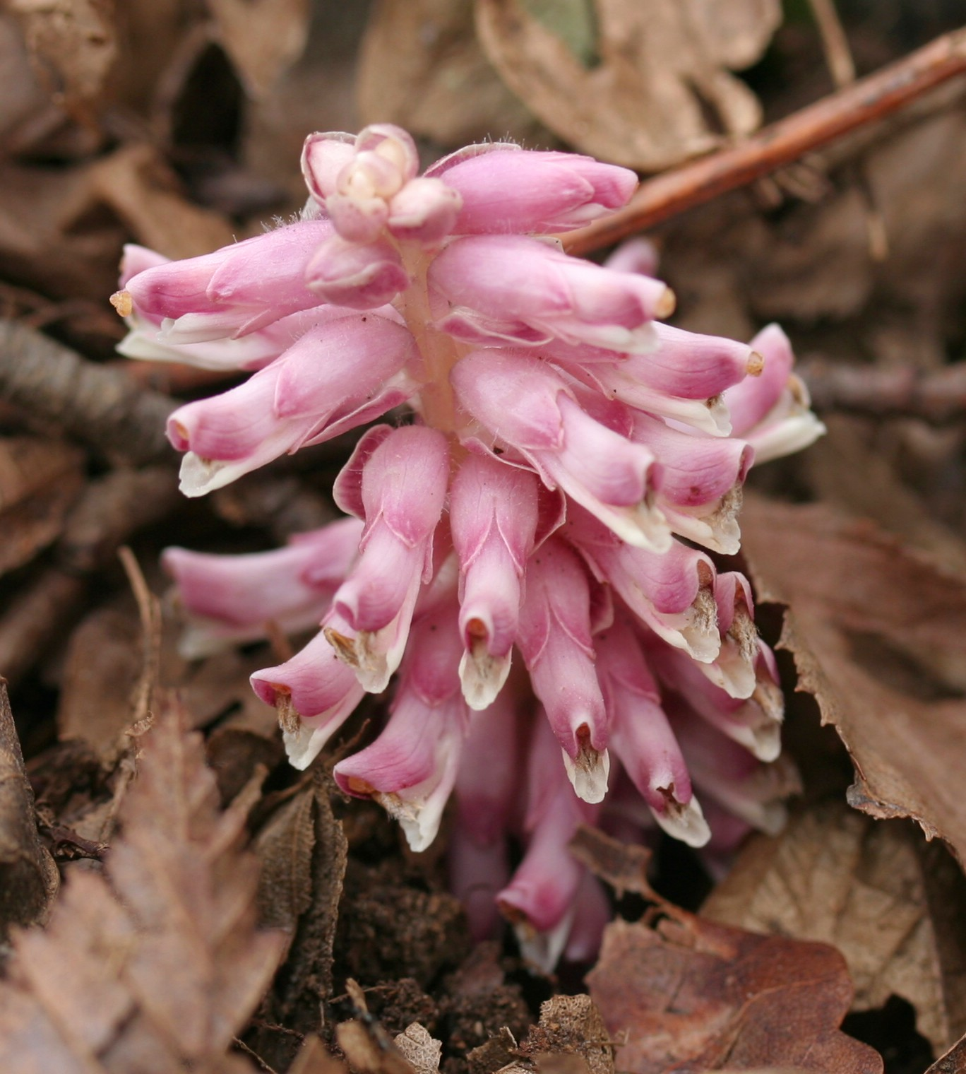 Lathraea squamaria Località: Villa Prima, Limana (BL), 350 m s.l.m. - 2/4/2008